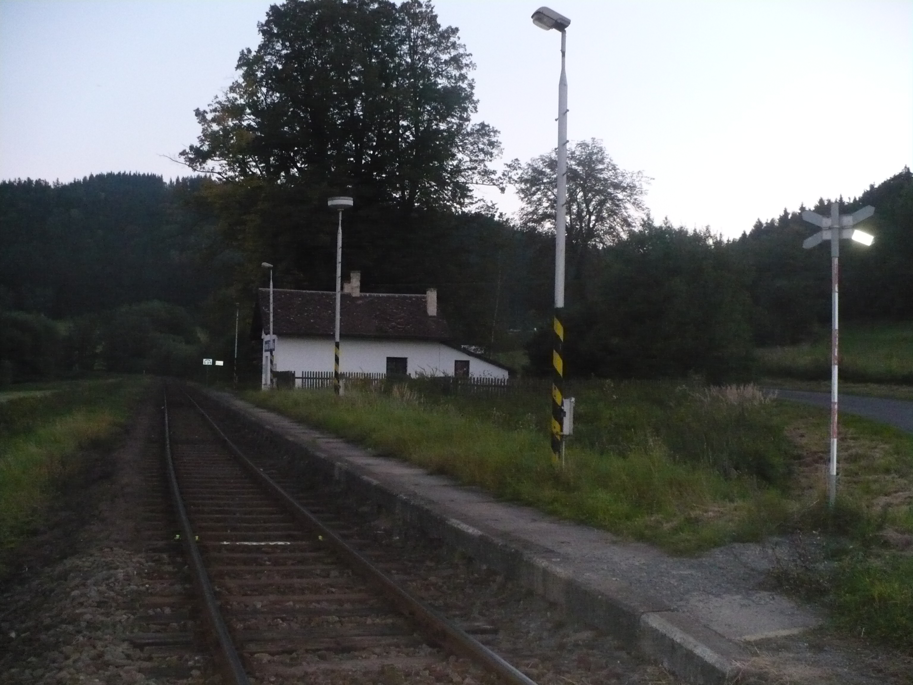 Vlaková zastávka Anenská Studánka - celkový pohled